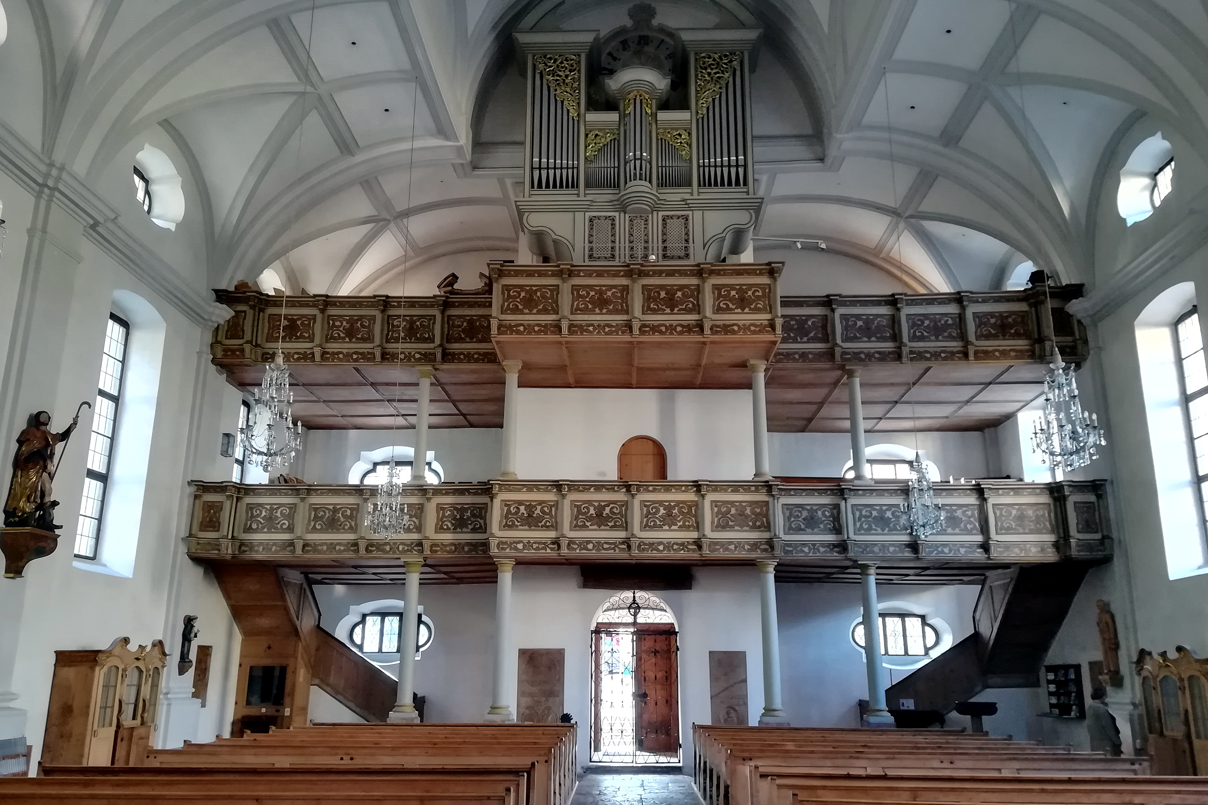 ie Pfarrkirche St. Andreas wurde von den Bürgern des Marktes Berchtesgaden im Jahr 1397 errichtet.